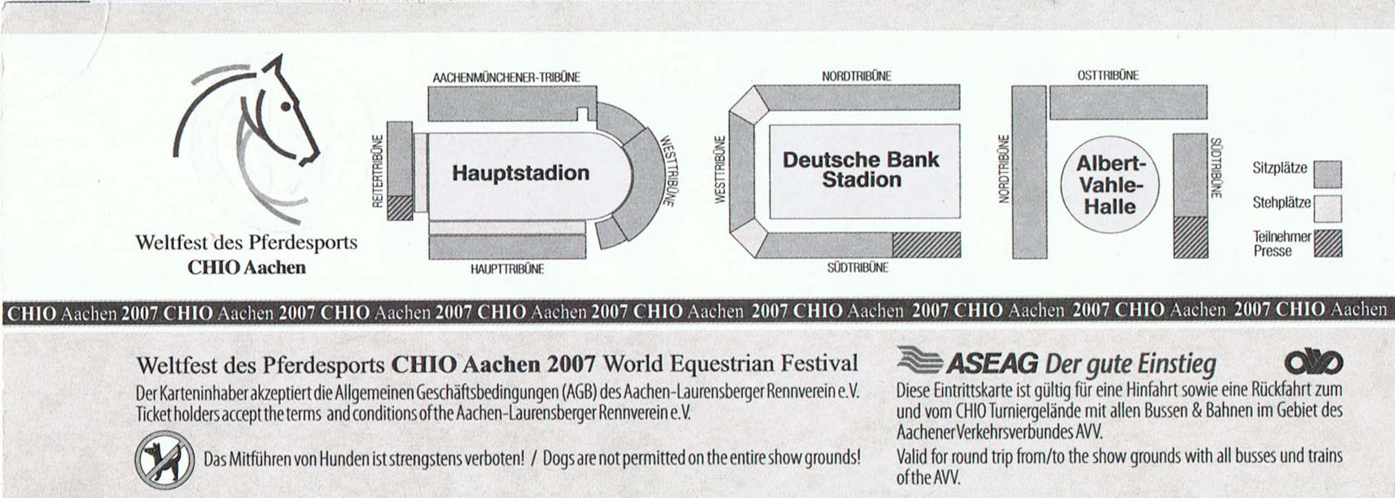 Rückseite einer Eintrittskarte zum CHIO-Aachen 2007 mit Tribünenübersichtsplan